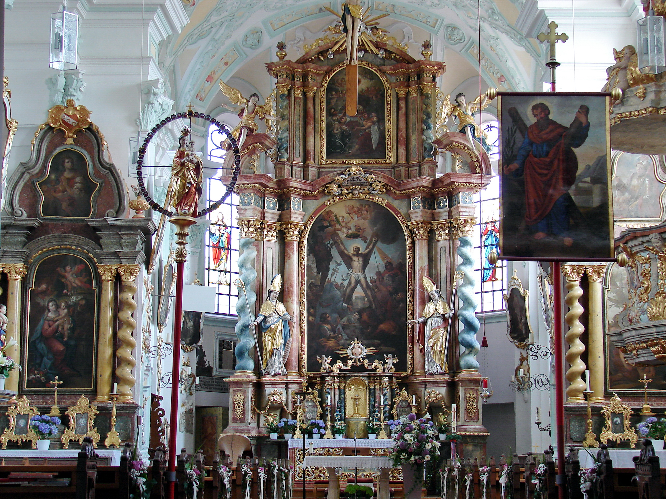 Pfarrkirche St. Andreas. Der Backsteinbau mit stattlichem Turm wurde ab 1462 erbaut und 1723 im Inneren nach den Plänen von Joseph Bader dem Älteren barockisiert.